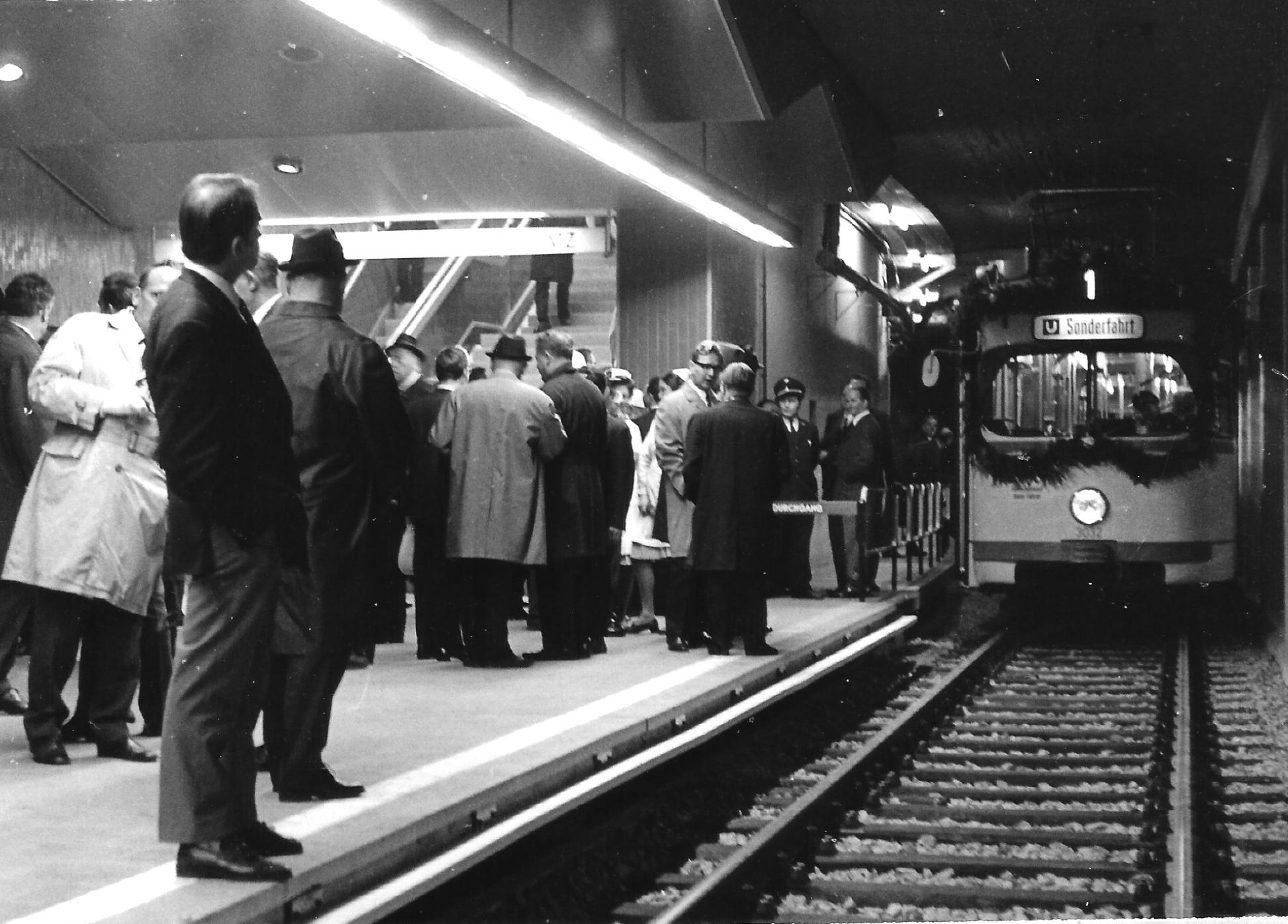 U-Bahn Haltestelle Dom/Hbf wird eröffnet 1968